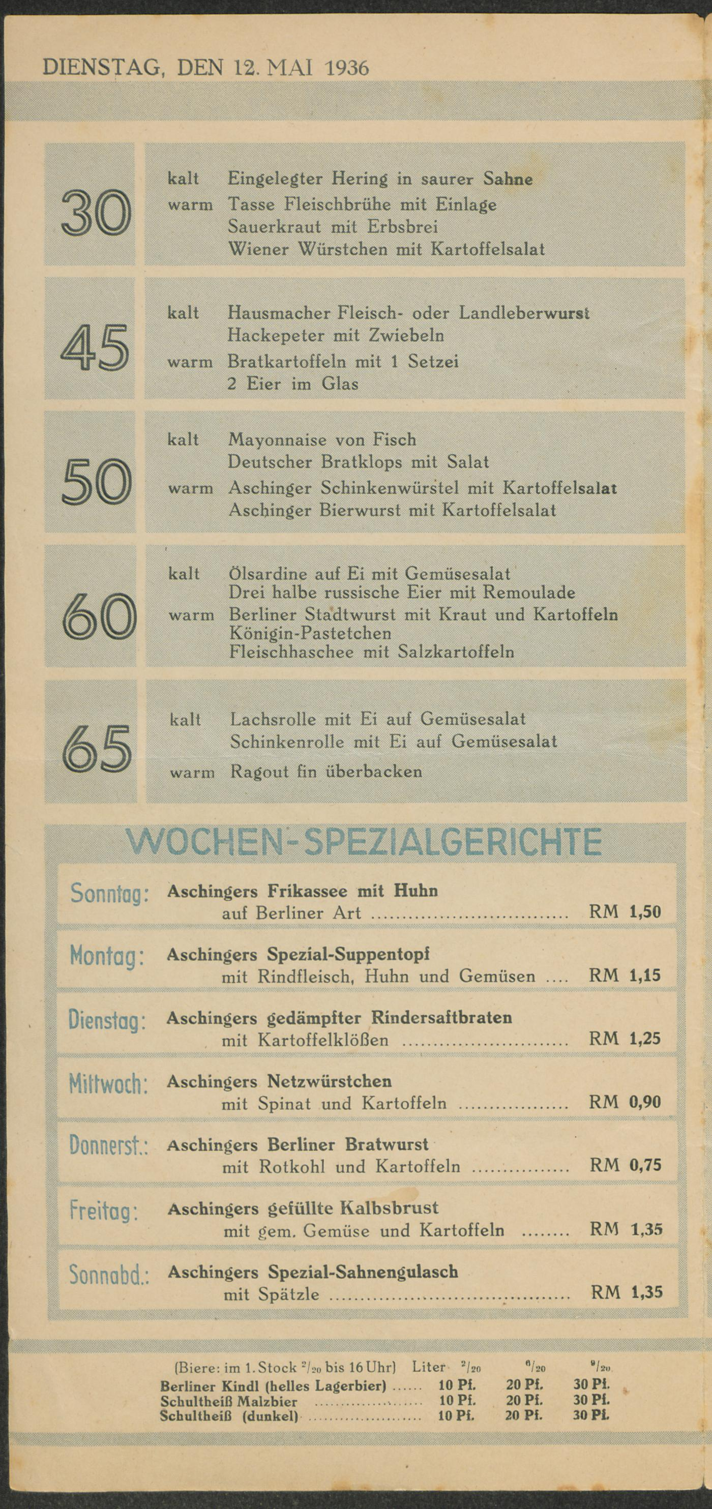 Speisekarte Aschinger, 30. (Bier-) Quelle, Friedrichstraße 97, 12. Mai 1936 Alle Inhalte von dilibri stehen unter der Creative Commons License, Attribution-NonCommercial-ShareAlike 3.0. Namensnennung: dilibri Rheinland-Pfalz (